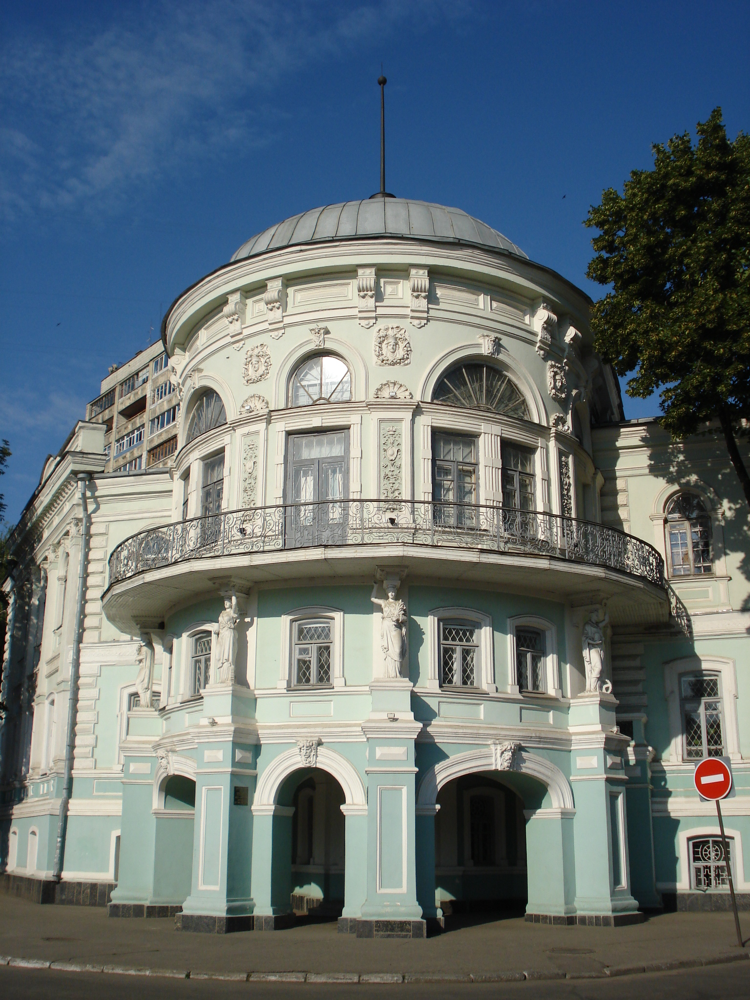 Будинок колишньої земської управи, який пов'язаний з революційними подіями 1905 року (мур.), Суми, вул. Г. Кондратьєва, 2